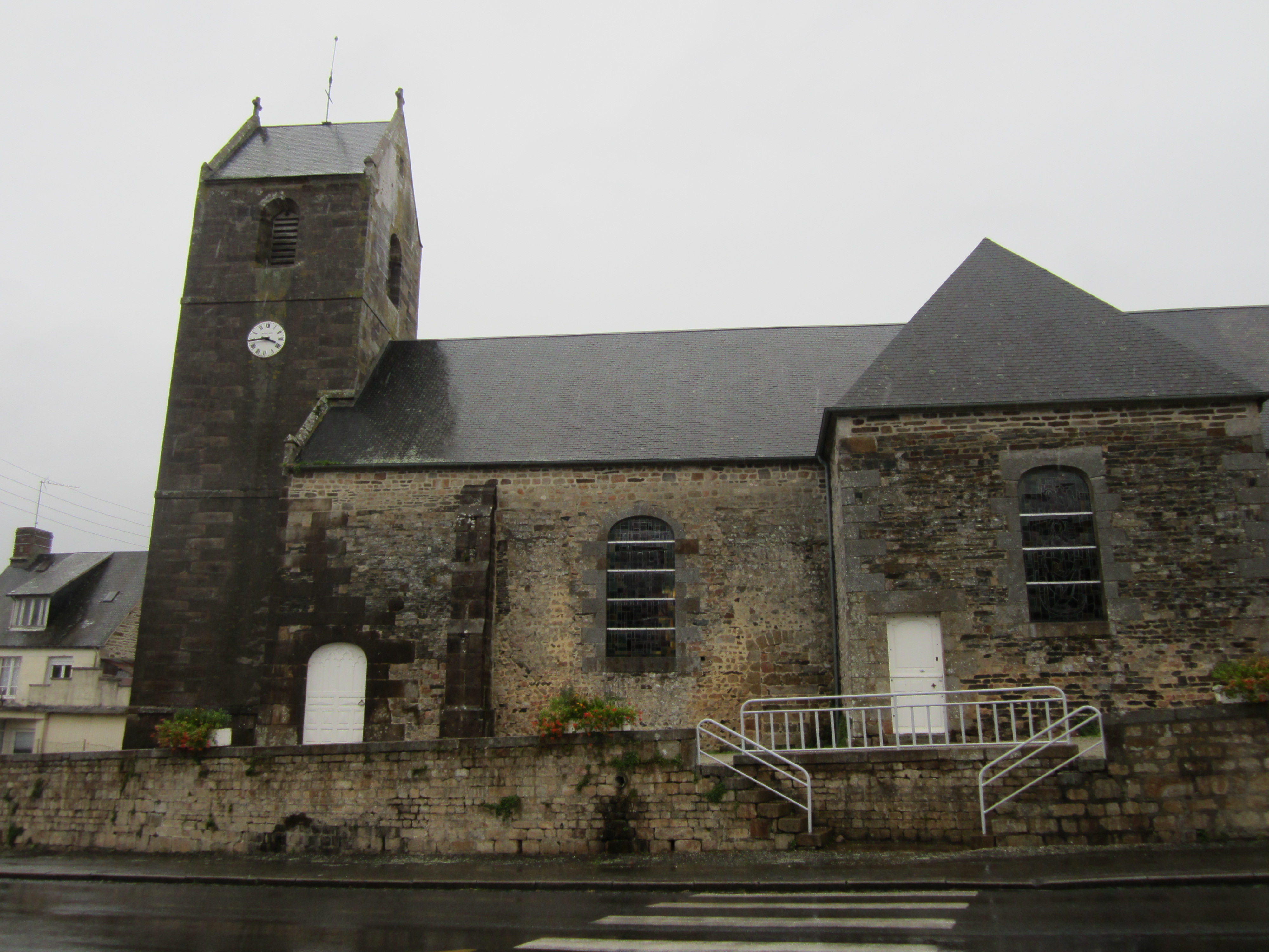 Chérencé-le-Roussel, Manche